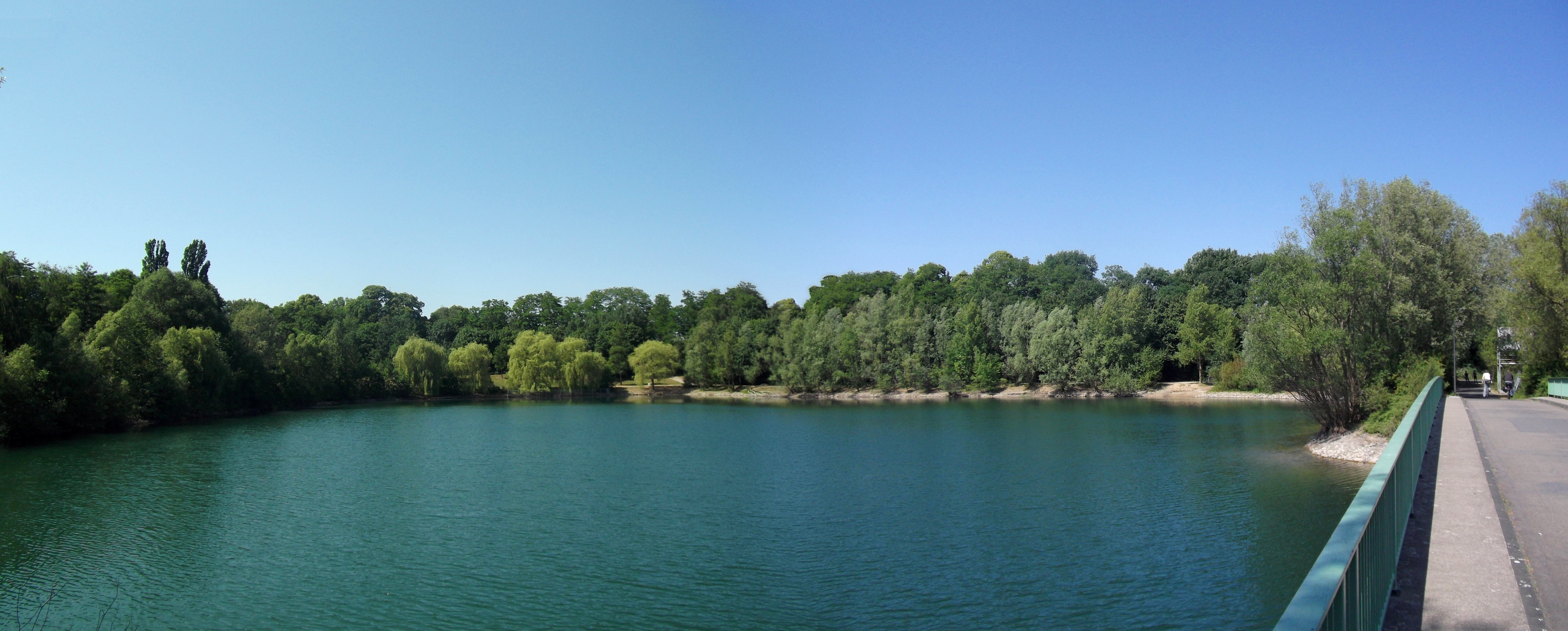 Cologne (Köln), Germany: Fühlinger See